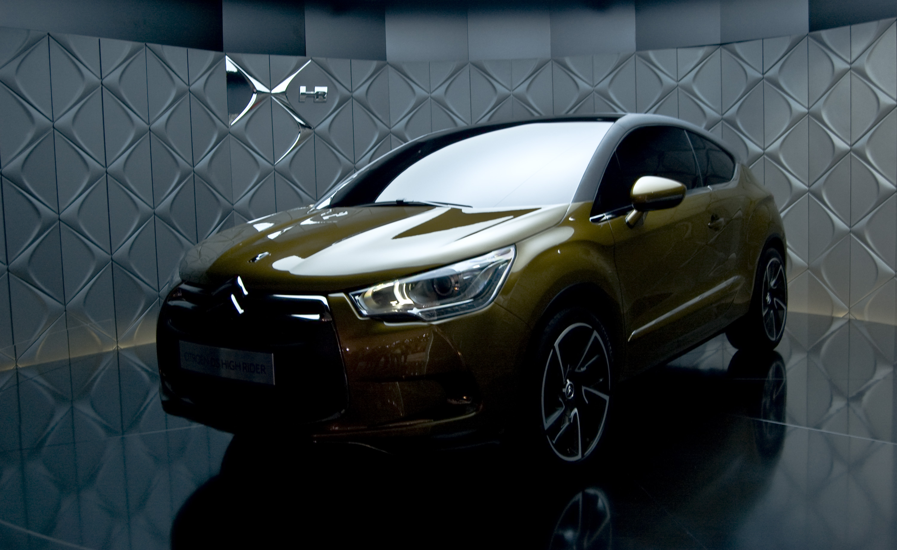 Citroën DS High Rider en el Salón de Ginebra 2010. Un adelanto del futuro Citroën DS4.